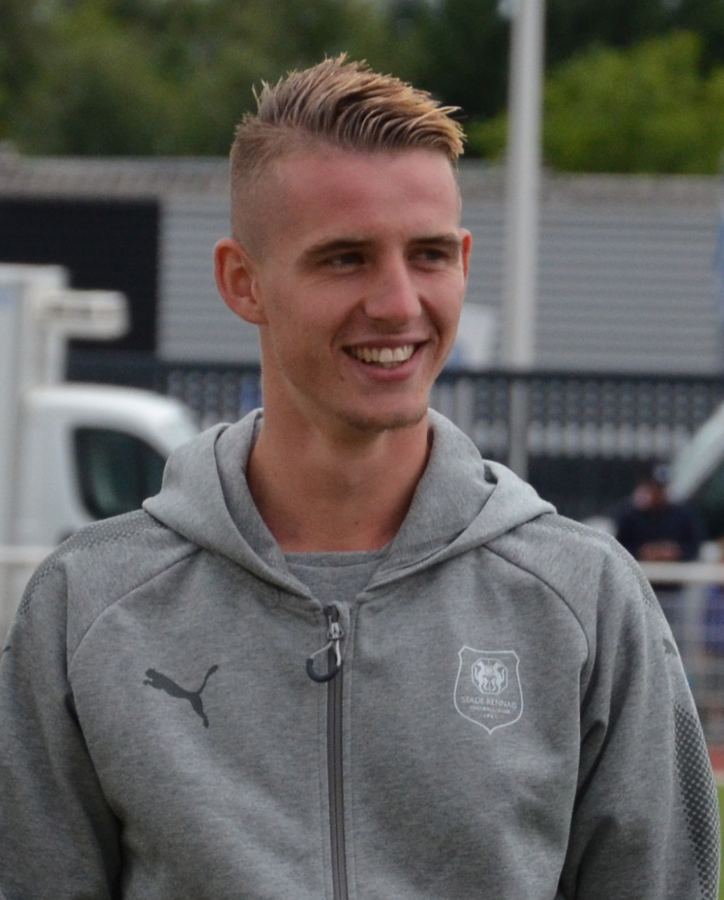 Photographie prise lors du match opposant le Stade rennais au SM Caen en match amical au stade Pierre-Compte de Vire le 22 juillet 2017. Ici, Benjamin Bourigeaud.